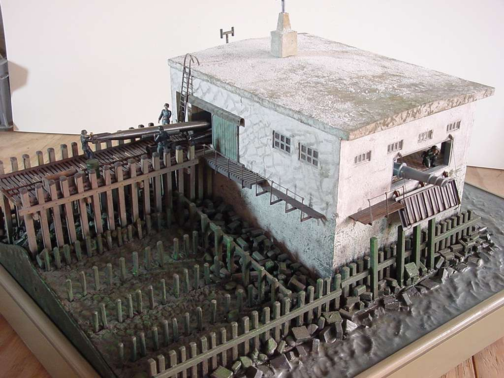 Deze bunker bevond zich aan het eind van het Westerhoofd. Over het hoofd liep een aanvoerrail. De torpedo's waren opgeslagen in de kazematten onder het Keizersbolwerk. Bij de terugtrekking van de Duitse troepen in 1944 is de installatie opgeblazen.